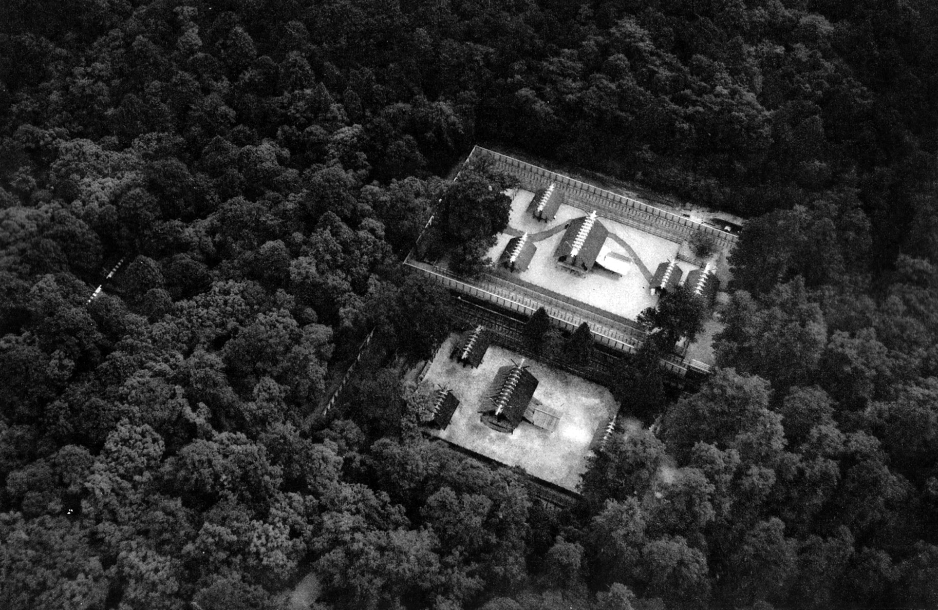 内宮(Naikū)新殿舎が完成した際の空撮写真。上が新殿舎、下が旧殿舎。